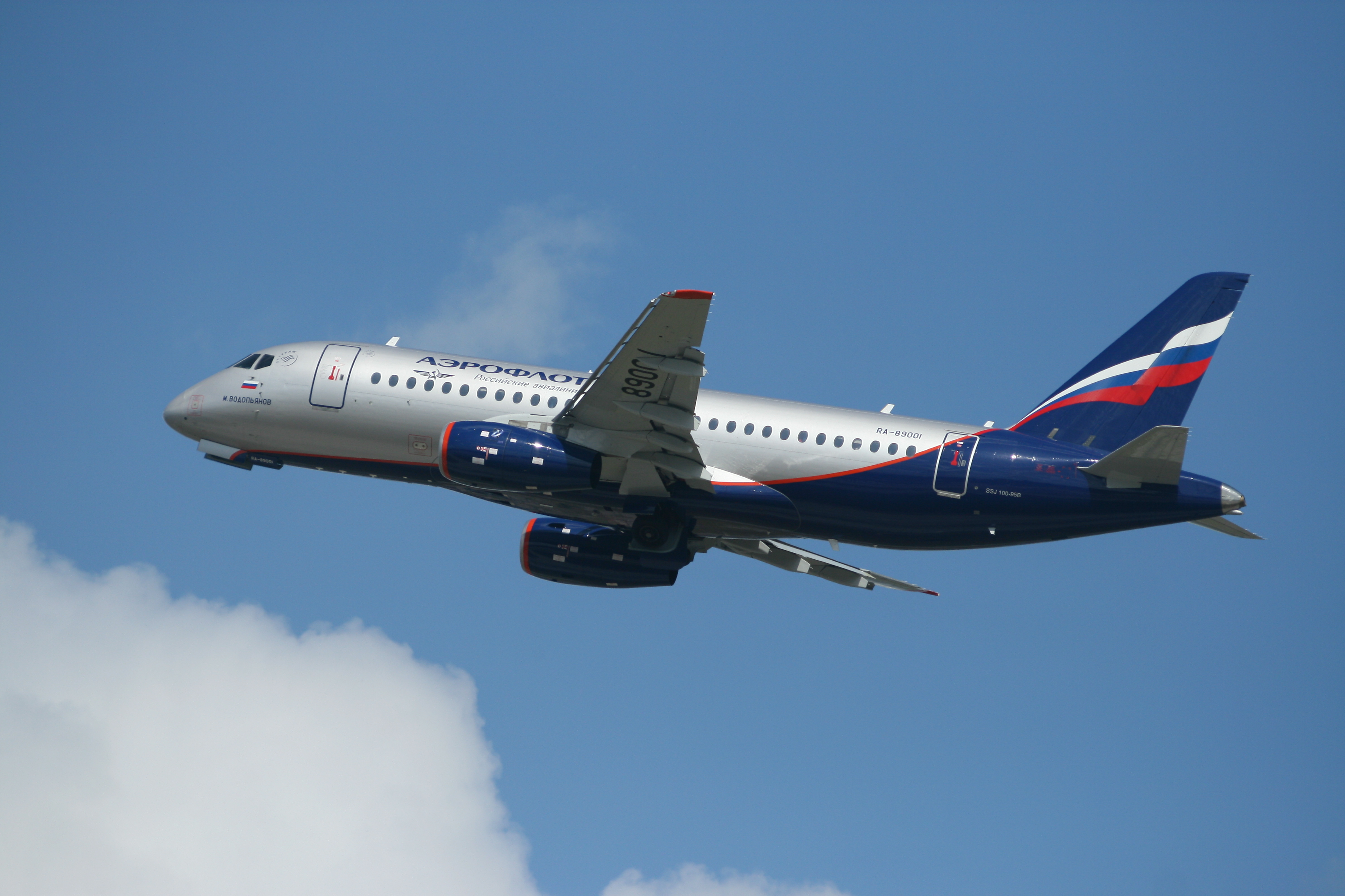 SSJ100 Mikhail Vodopyanov